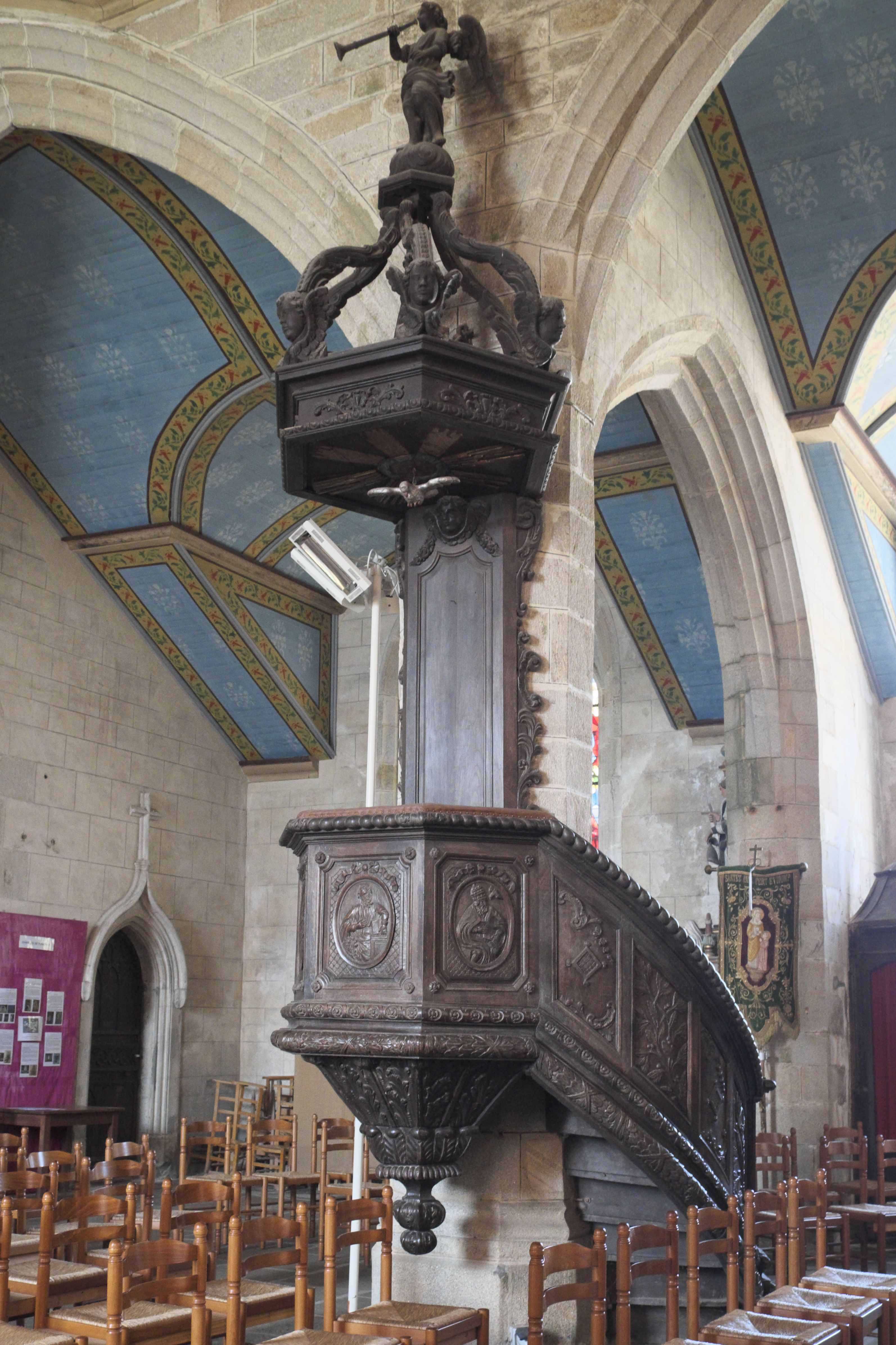 Katholische Pfarrkirche Saint-Thurien in Plogonnec im Département Finistère (Region Bretagne/Frankreich), Kanzel